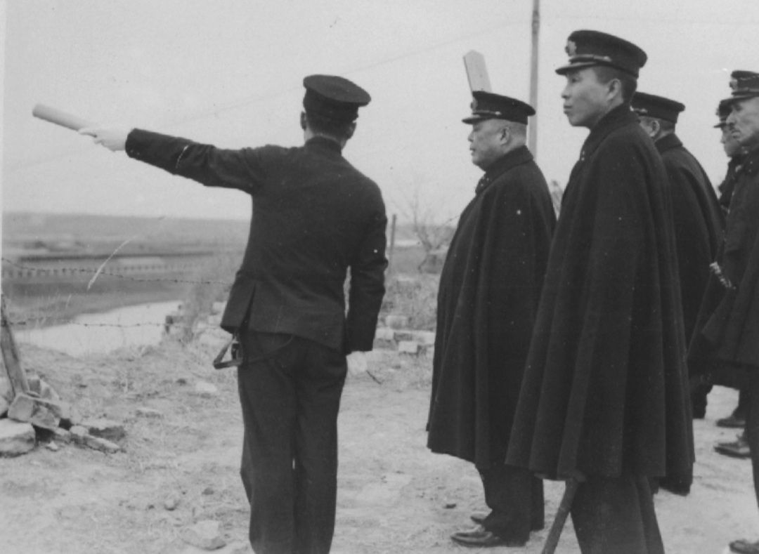 Admiral Mineo Oosumi